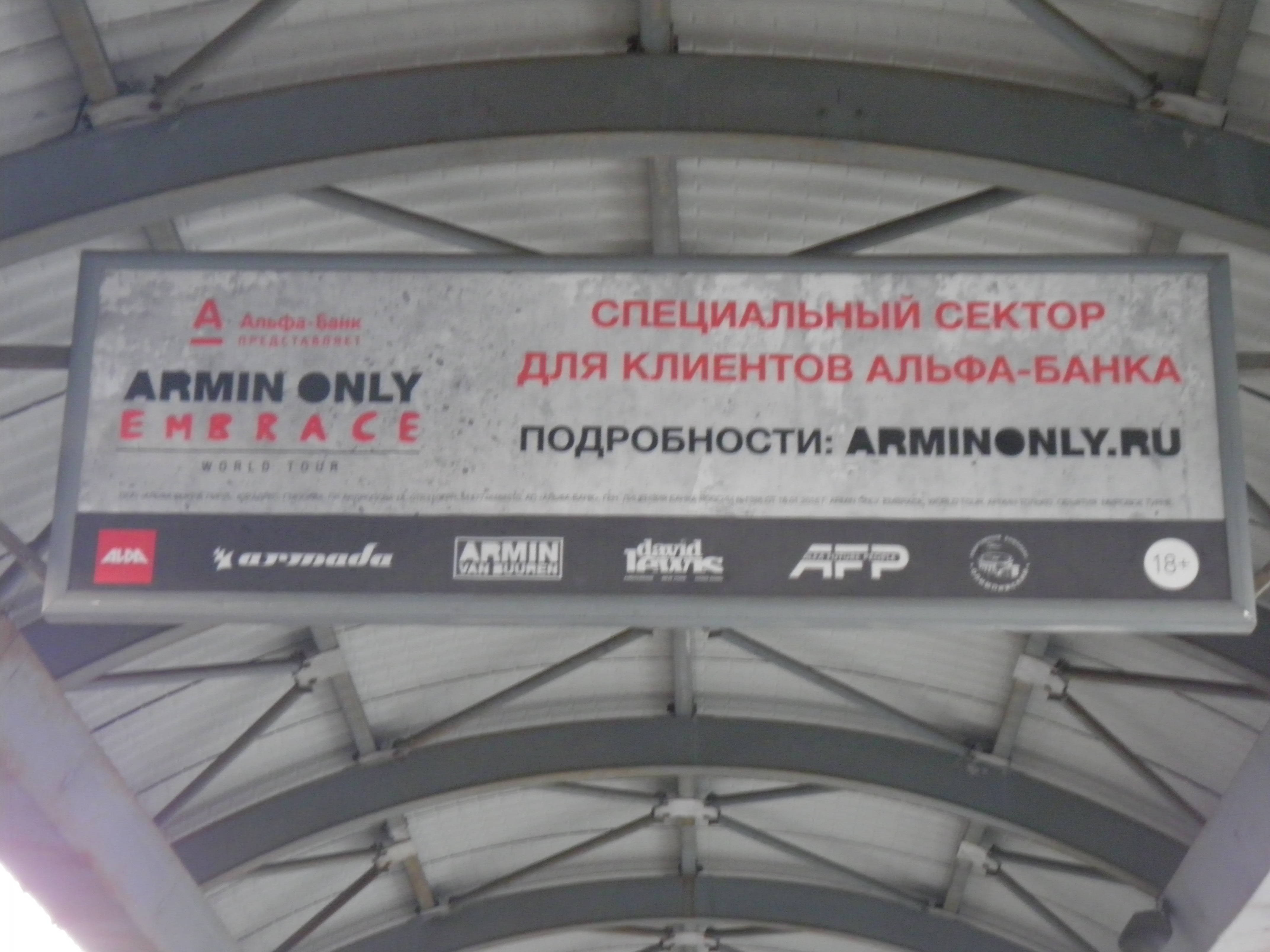 Affiche du concert d'Armin van Buuren à la gare de Saint-Pétersbourg (Russie).